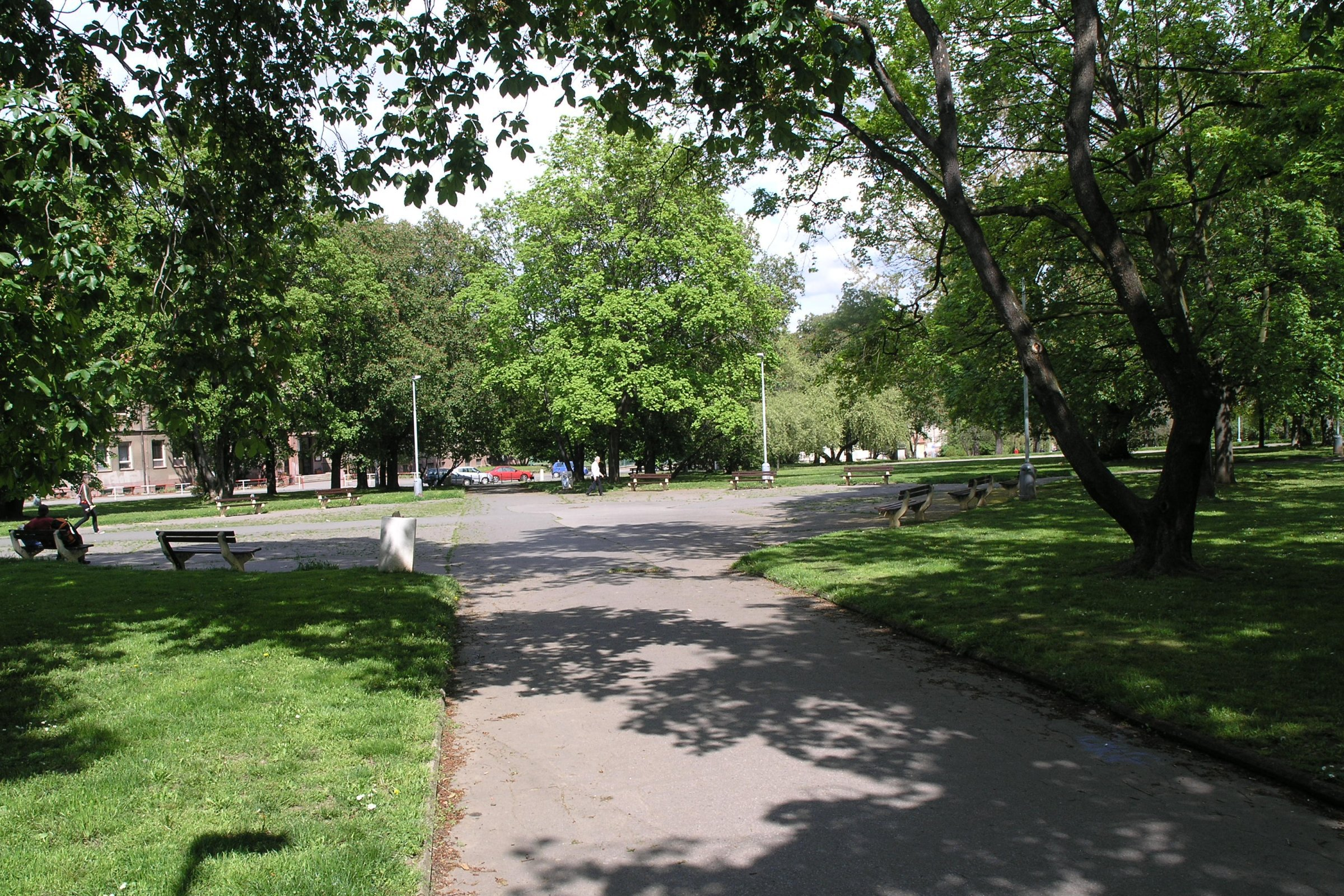 Praha, Bubeneč - park Generála Lázaro Cárdenase